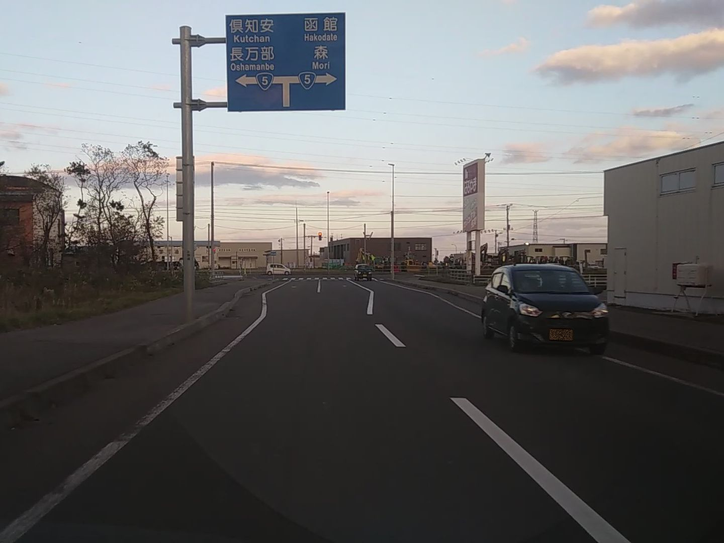 北海道道42号八雲北檜山線・起点及び国道5号交点-1（終点側から）